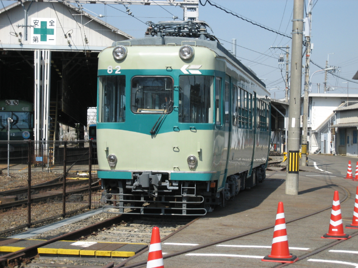 錦織車庫に保存されている京阪80形電車